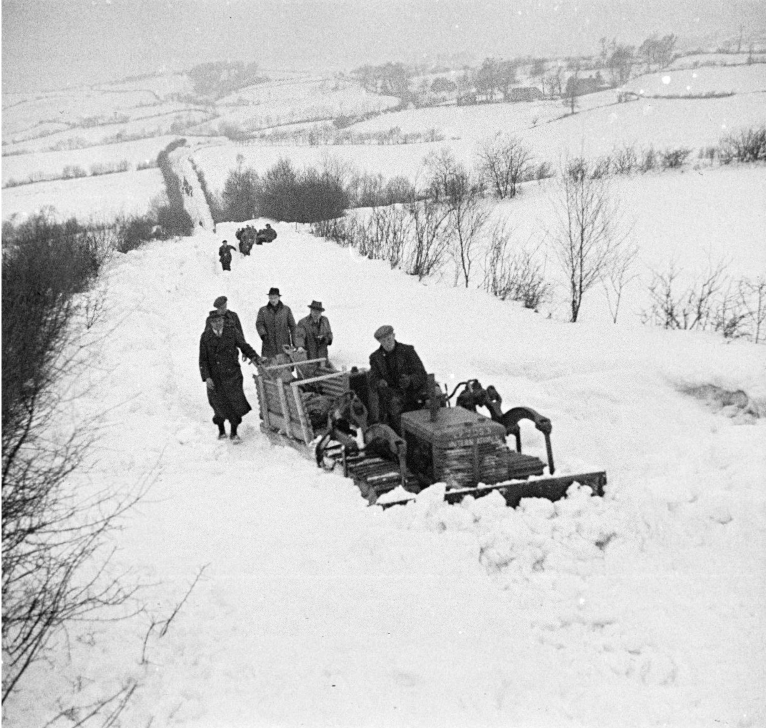 Teitl Cymraeg/Welsh title: Tarw dur, tractor a sled yn dosbarthu bara i bentre Llanwddyn yn ystod yr eira Cyfrwng/Medium: Negydd ffilm / Film negative Cyfeiriad/Reference: (gcc04387) Rhif cofnod / Record no.: 3472730 Rhagor o wybodaeth am gasgliad Geoff Charles yn Llyfrgell Genedlaethol Cymru More information about the Geoff Charles Collection at the National Library of Wales Mae ffotograffau Geoff Charles hefyd yn rhan o Broject Europeana Libraries Geoff Charles' photographs also form part of the Europeana Libraries Project